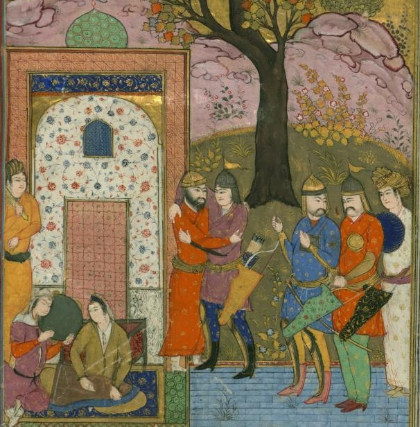 Caicaus recebeu Caicosroes quando chega do Turanistão